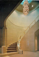 Torii_(Tokutoshi)_Tokio,_Taiwan_Embassy_1987-89